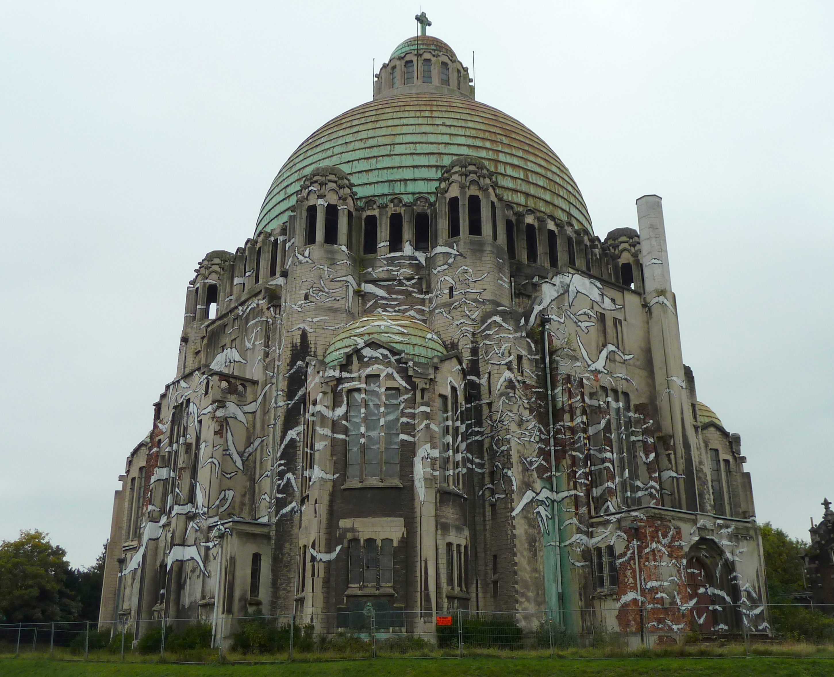 Église du Sacré-Cœur et Notre-Dame-de-Lourdes en 2015, après avoir été désacralisée en 2010